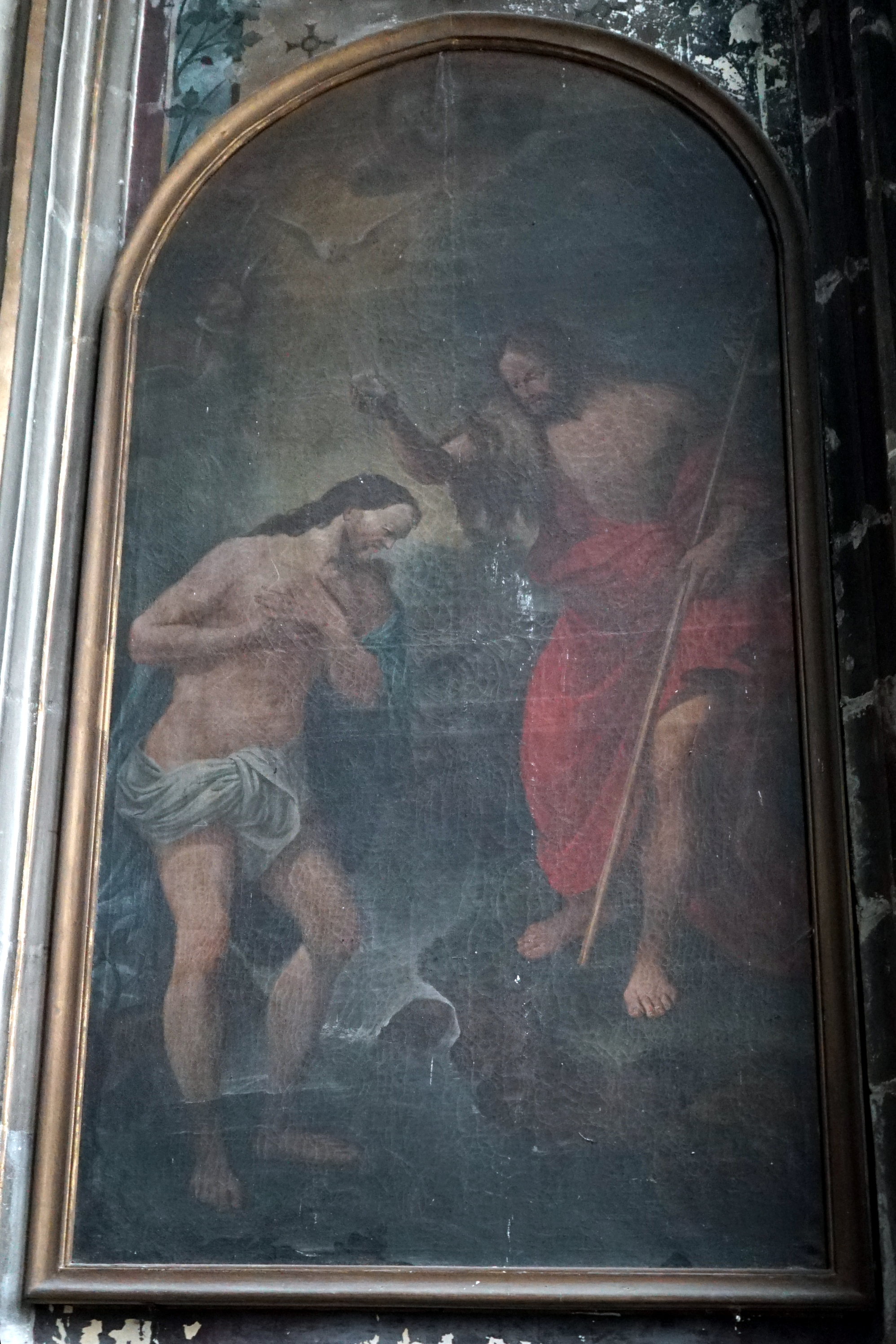 en la cathédrale de Chaumont.